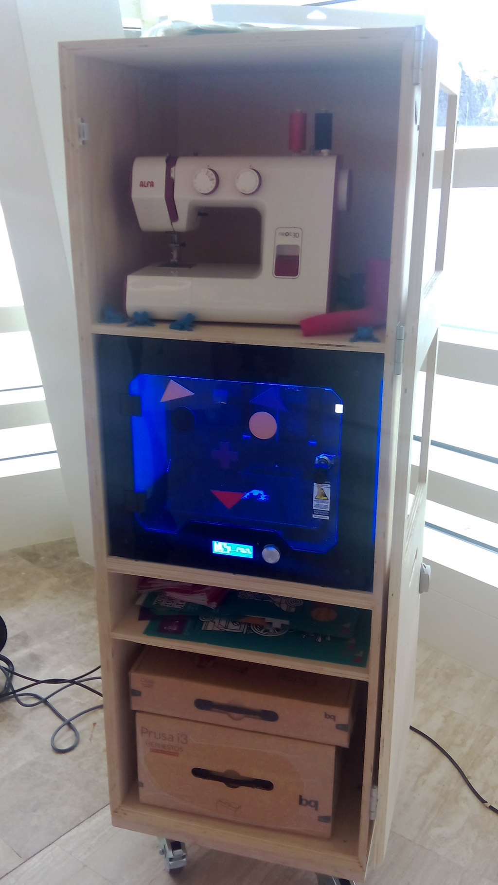 Impresora 3D de bq na cidade da cultura, Compostela.